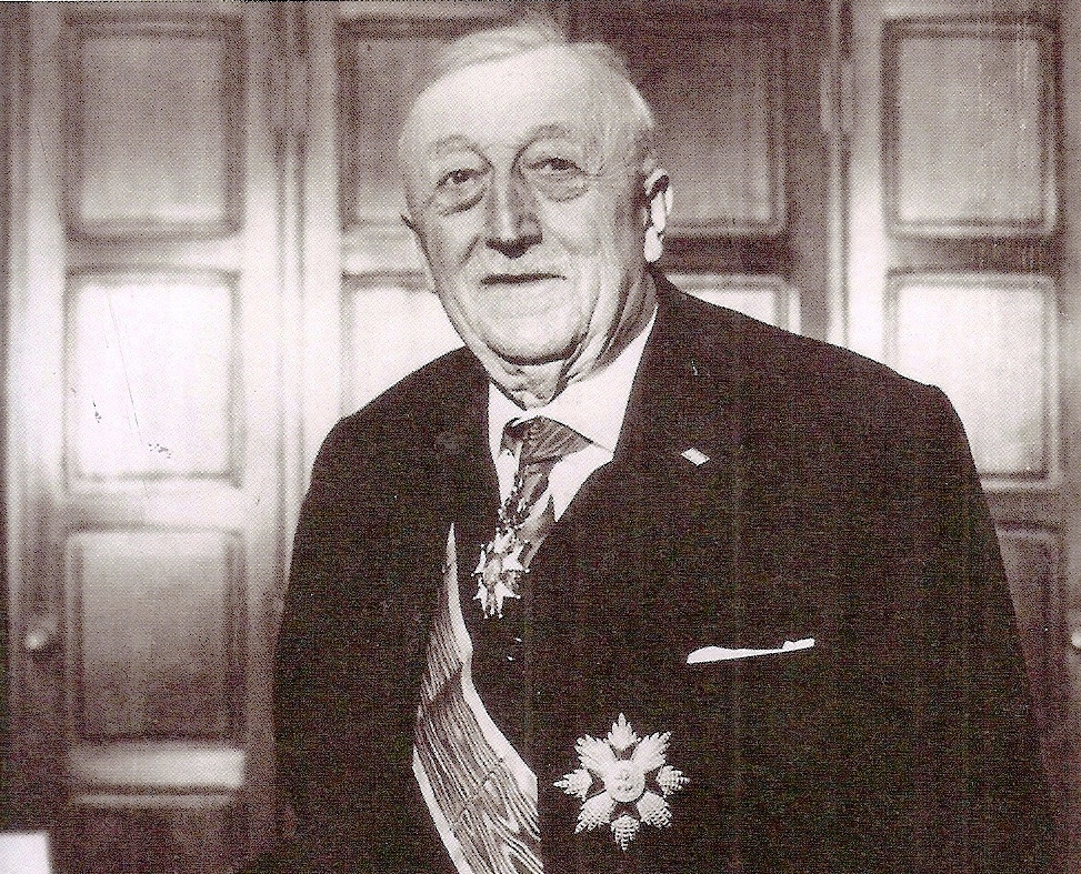 Francois Hébrard, président de la FSCF et de la FICEP